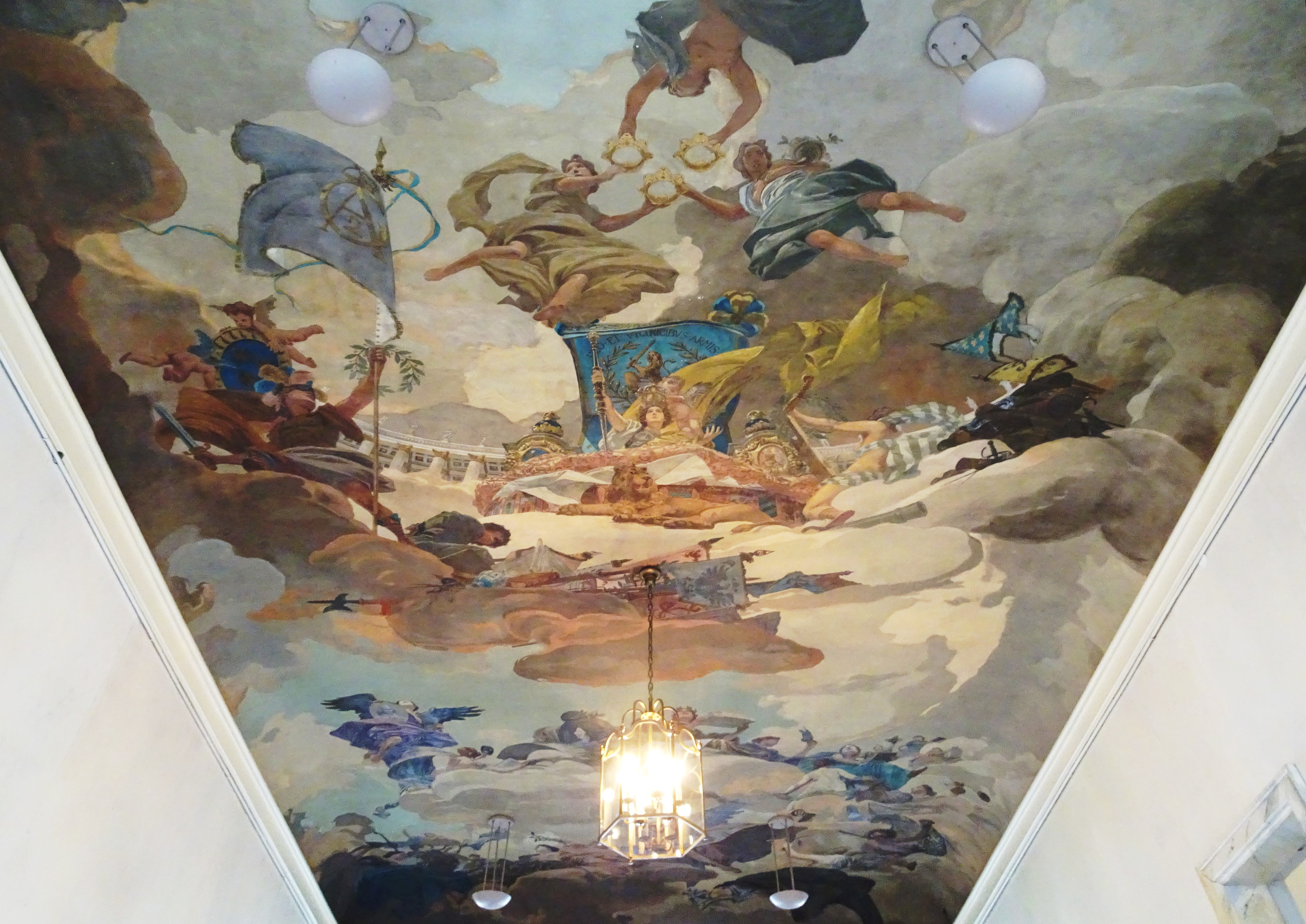 Van der Nootska palatset, huvudtrappan, takmålning av Vicke Andrén